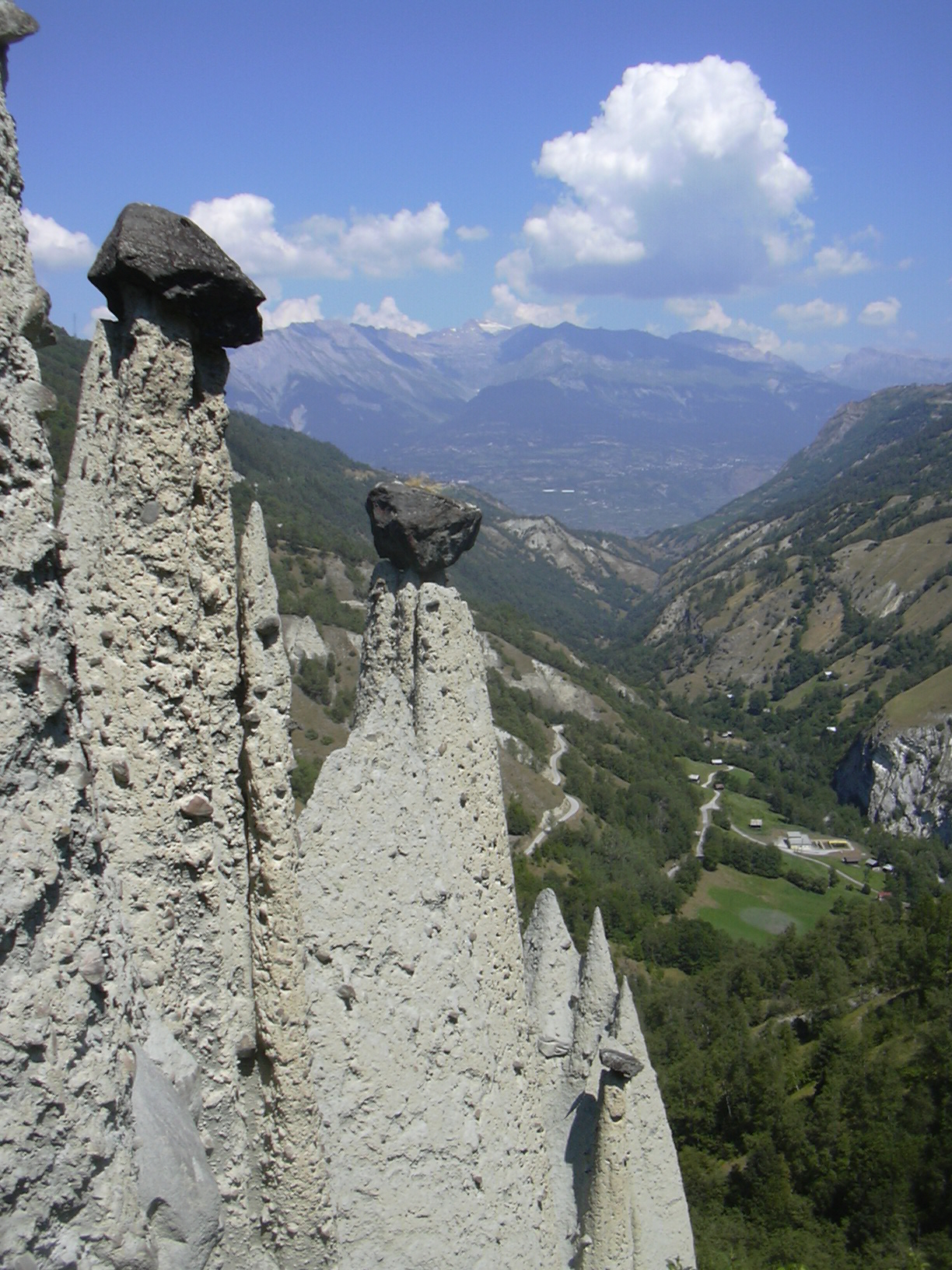 Pyramides of Euseigne, Val d'Hérens, lower Borgne Valley (Switzerland)